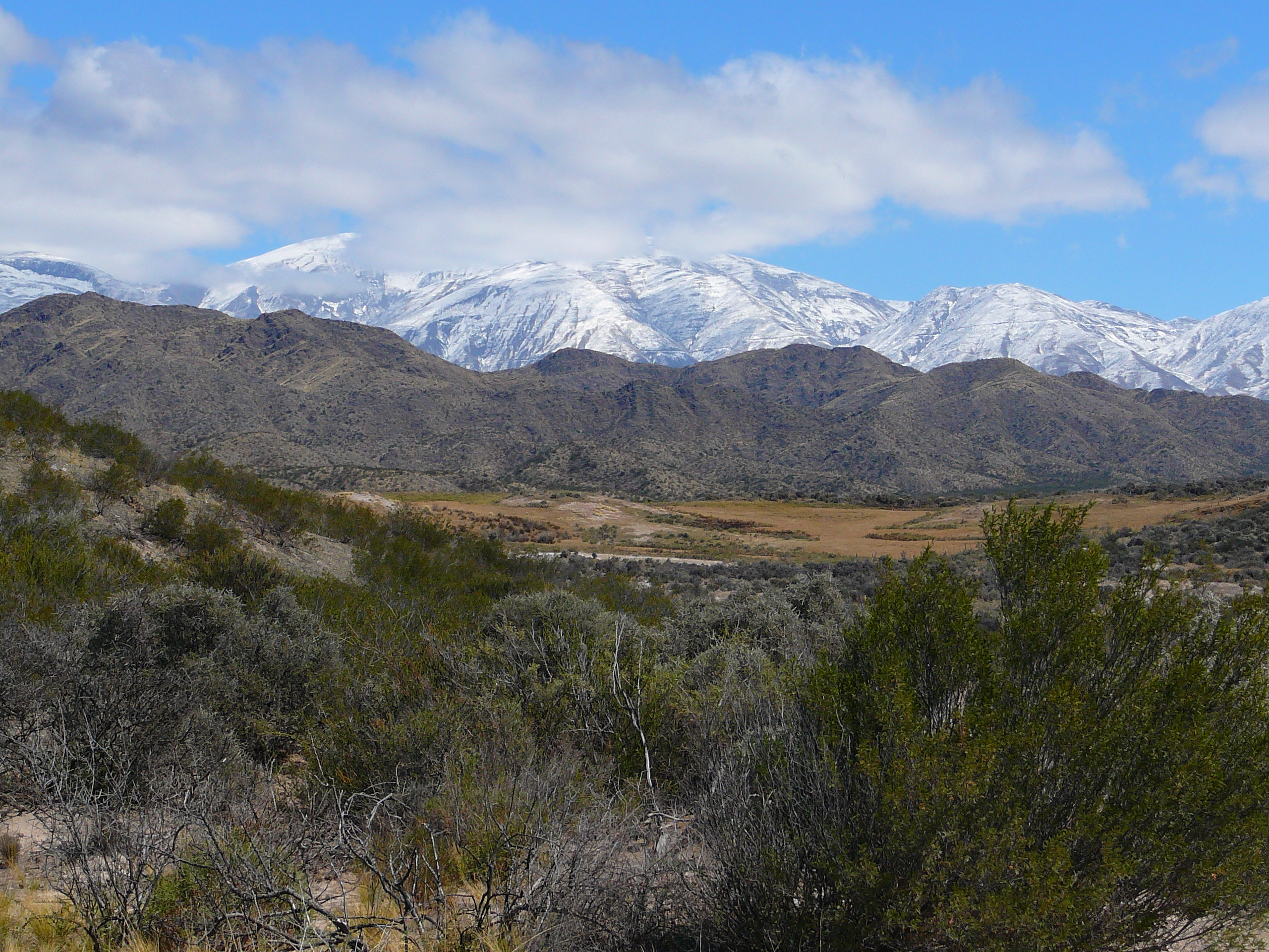 Paisaje desde la estancia Mardona en el departamento Zonda, en la provincia argentina de San Juan.